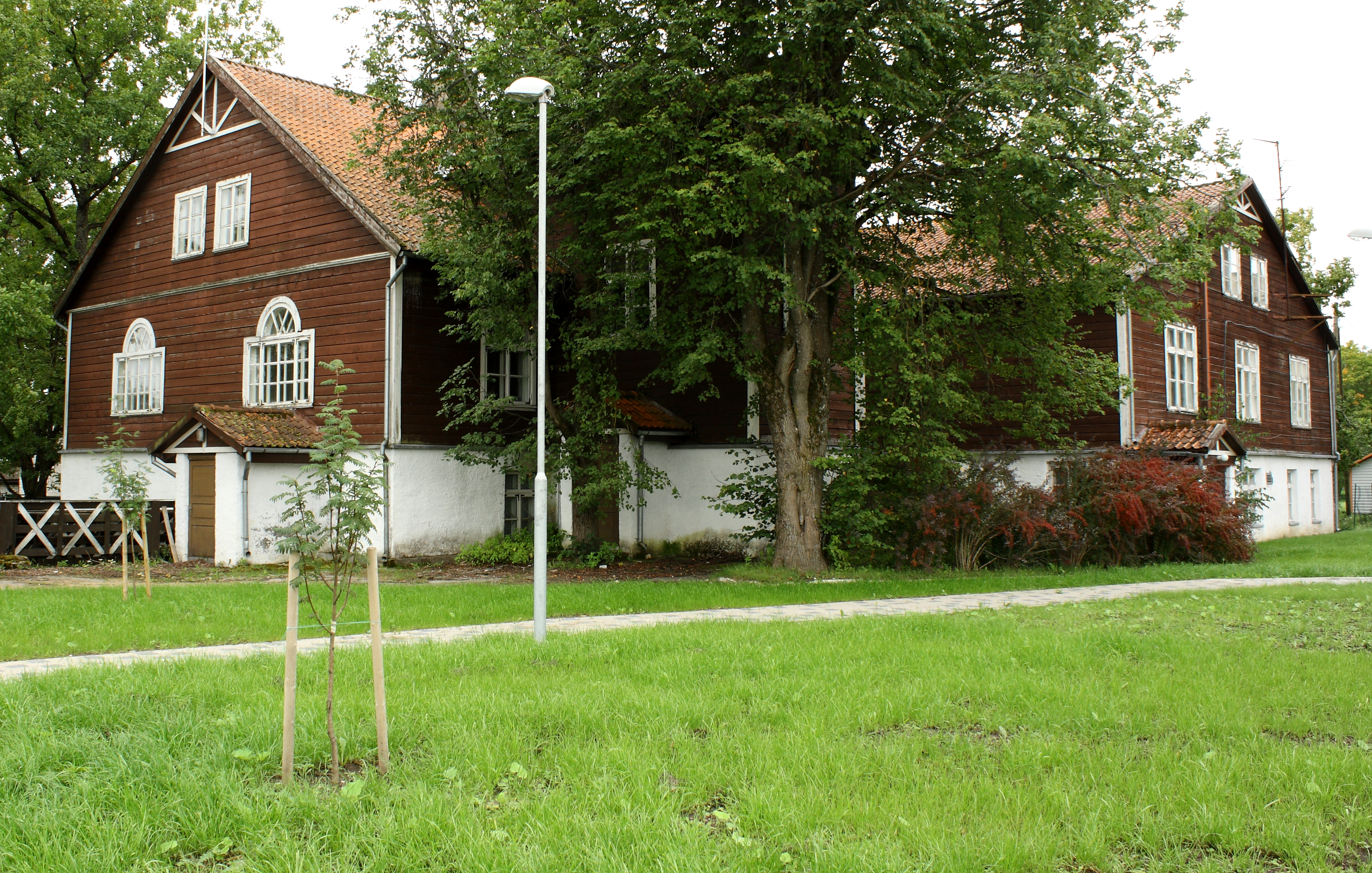 Koolihoone Paides Tallinna tn.60 ehitismälestis